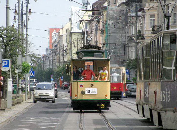 Linia 10 Herbrand GE-58 prawidłowa nazwa tramwaju